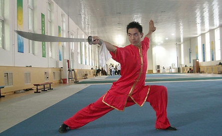 Zhou Yaohu fra Beijing Sport University